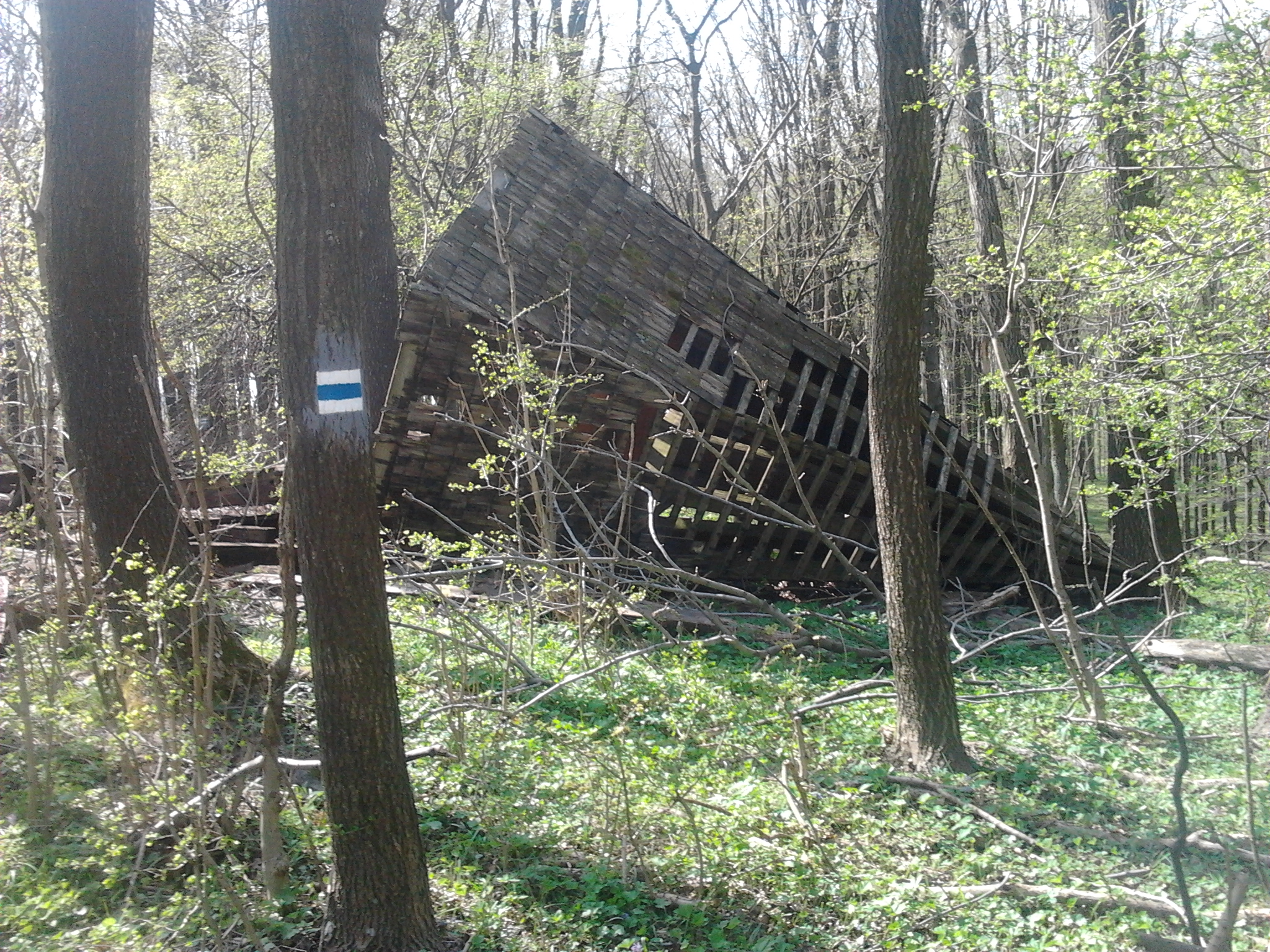 A Kós Károly-kilátó romjai az Országos Kéktúra útvonalán, a Csór-hegyen, Parádsasvártól délnyugatra.